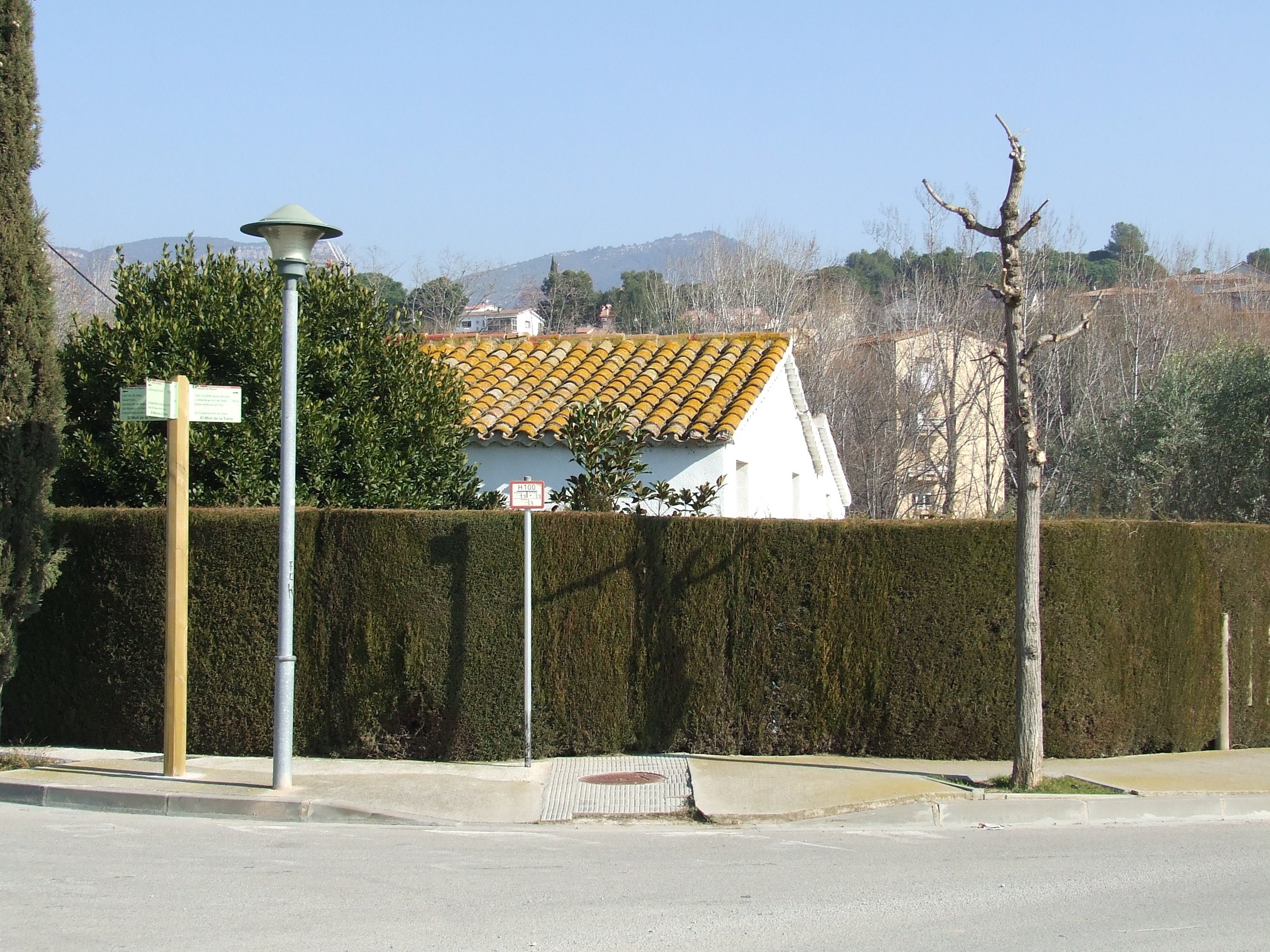 Cal Ferrer (Bigues, Bigues i Riells, Vallès Oriental).